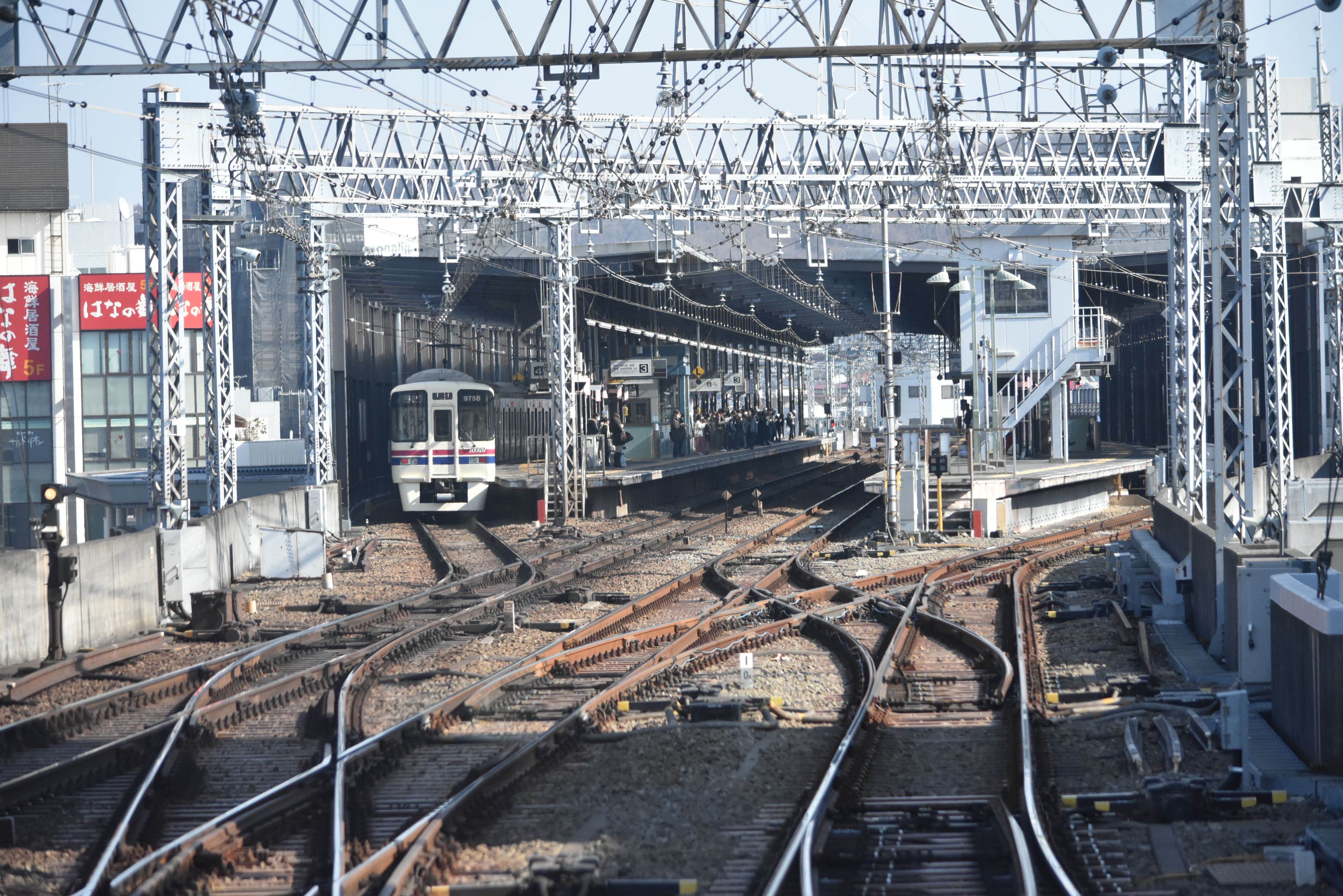 京王線 北野駅 Nikon D3400